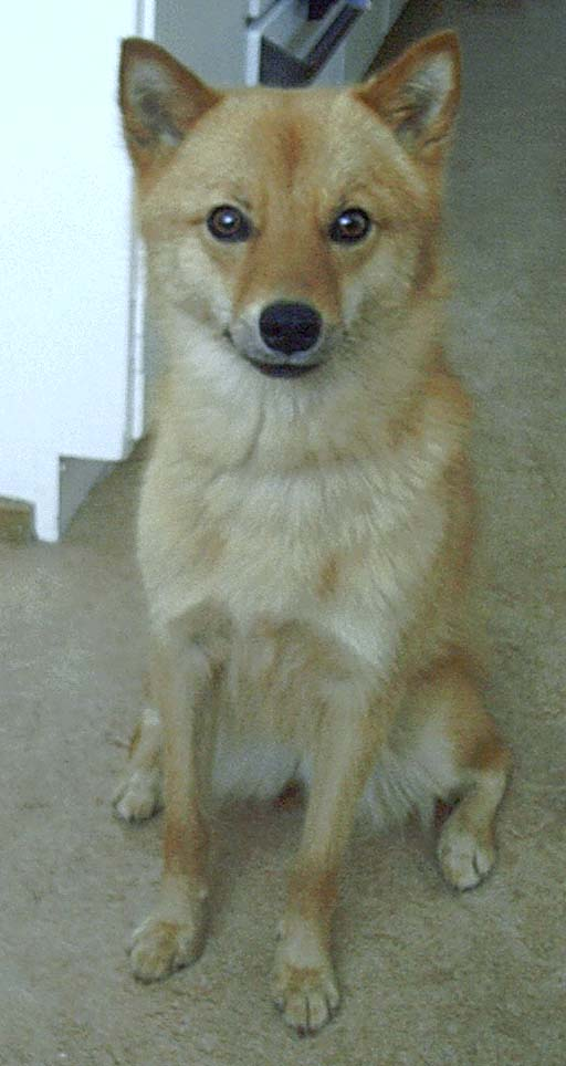 Finnish Spitz female named Lisa